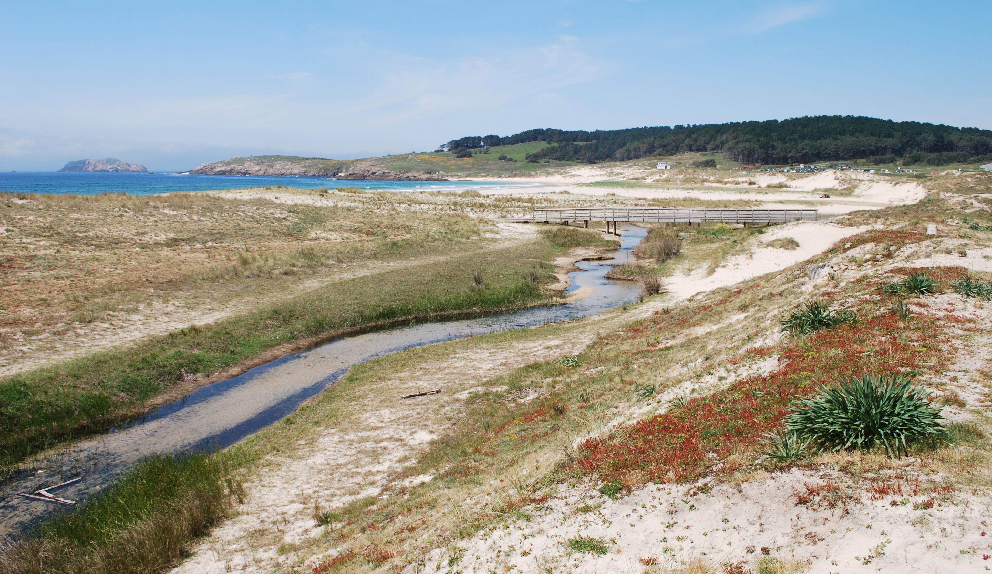 Vista do acceso á praia de Doniños polo areal Ferrol A Coruña Galiza Spain